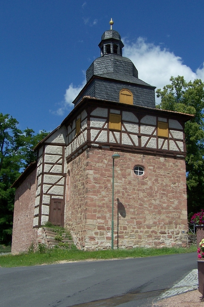 Die Kirche in Wildprechtroda. Ansicht von Osten.